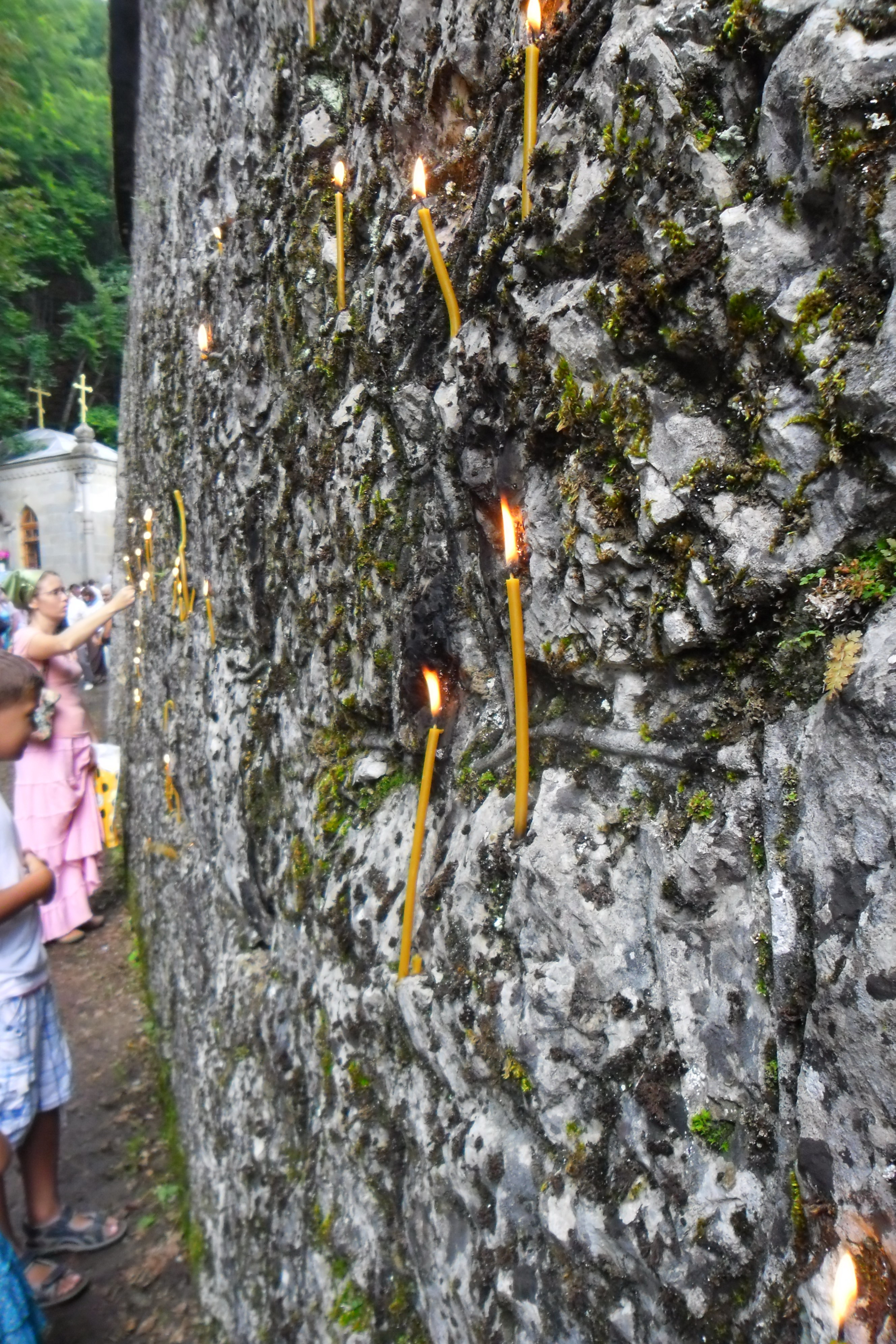 Фото